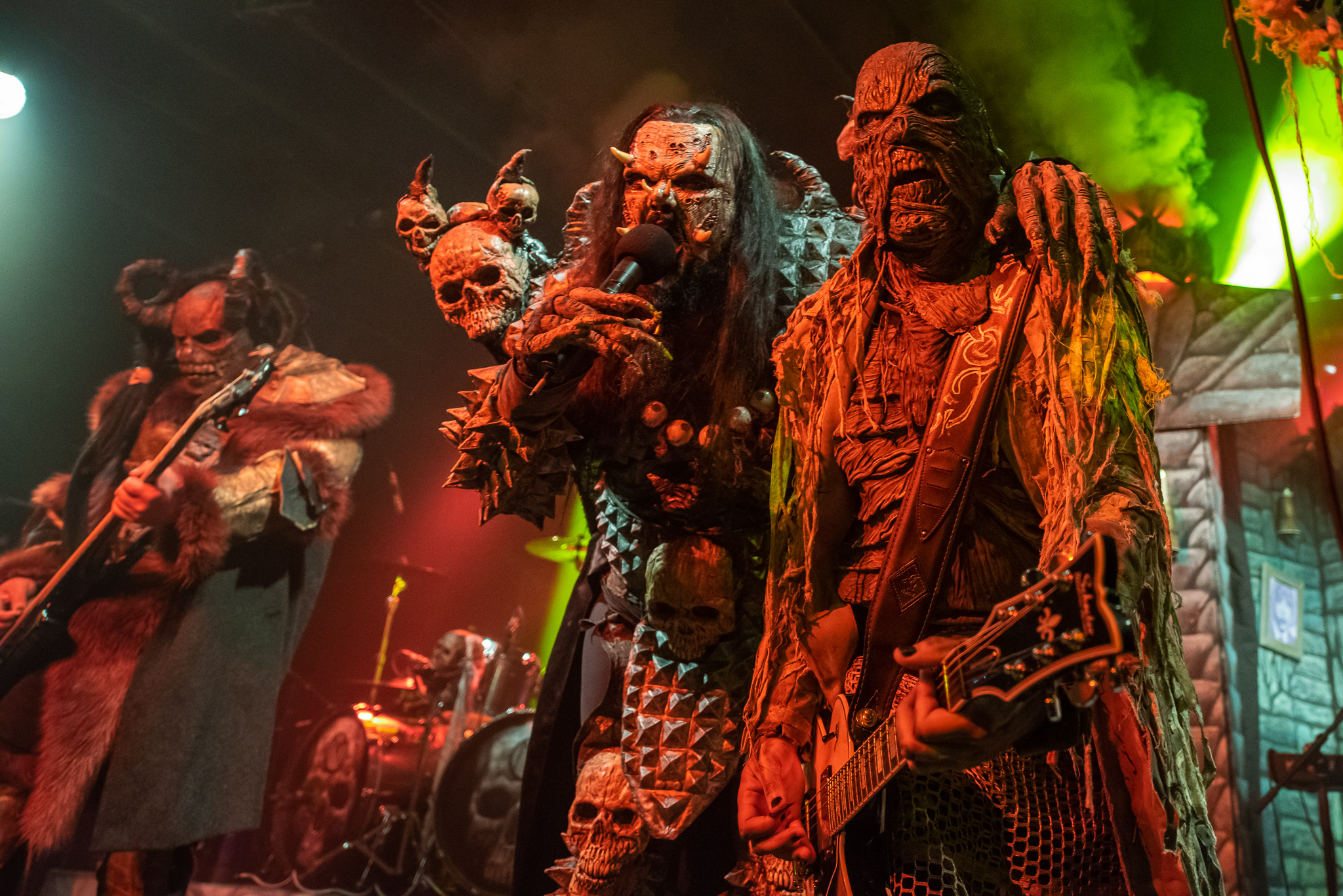 Amen,Concertbüro Franken,Der Hirsch,Hella,Henna-Riikka Paakkola,Jussi Antero Sydänmaa,Konzert,Livekonzert,Livemusik,Lordi,Mr. Lordi,Musik,OX,Samer el Nahhal,Tomi Petteri Putaansuu